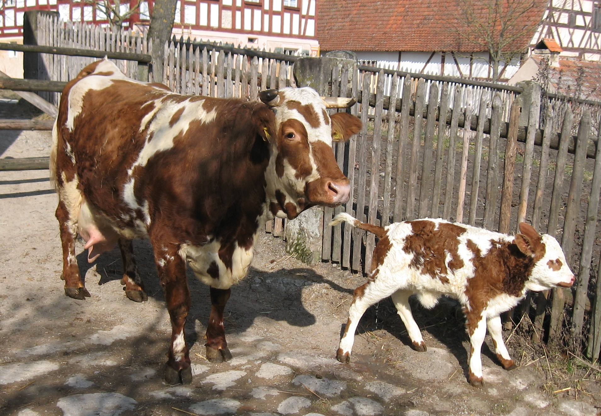 Tiger-Kuh mit Kalb im Freilandmuseum Bad Windsheim